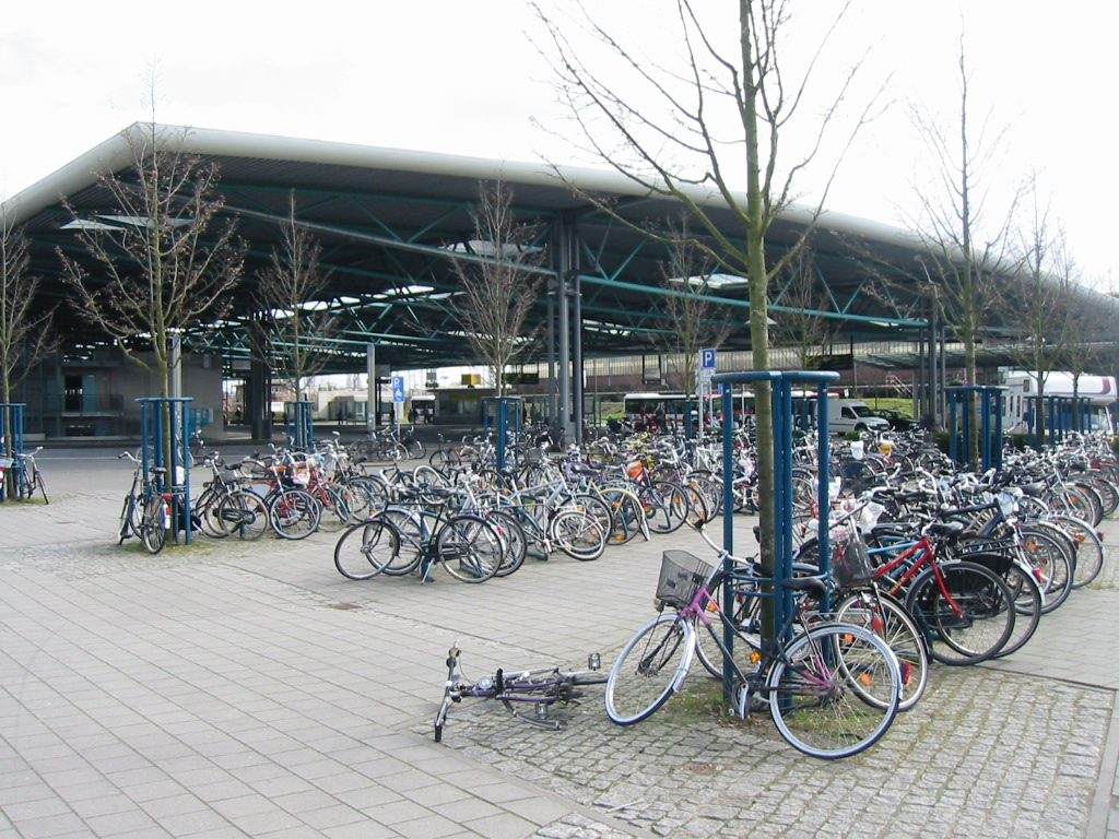 ZOB bei Oldenburg Hauptbahnhof